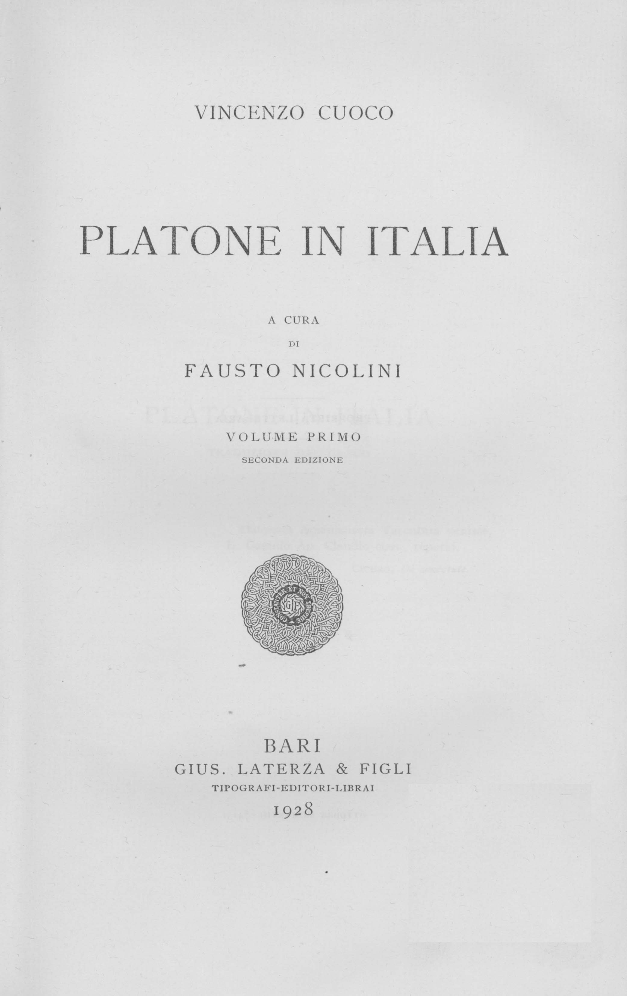 Platone in Italia. 1 / Vincenzo Cuoco ; a cura di Fausto Nicolini. - Bari : G. Laterza & figli, 1916. - 301 p. ; 22 cm. - (Scrittori d'Italia ; 74) .